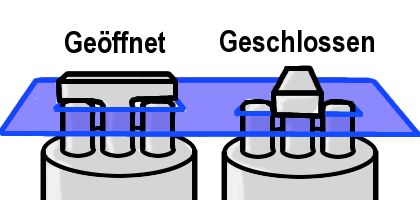 Das Prinzip eines Kensington-Schloss Sonstiges: Blafasel